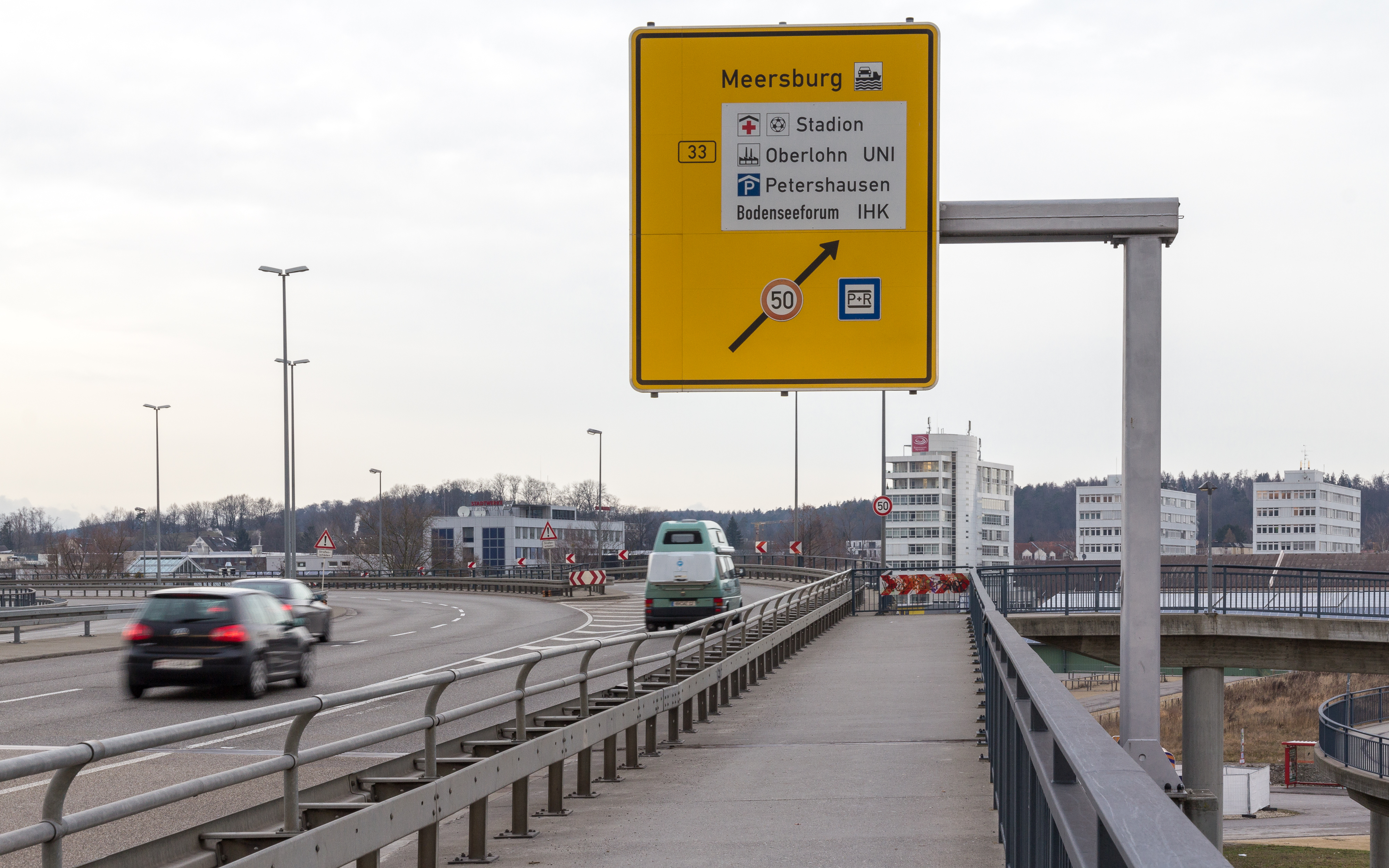 Auf der Schänzlebrücke (B33n) Richtung Nord, Konstanz